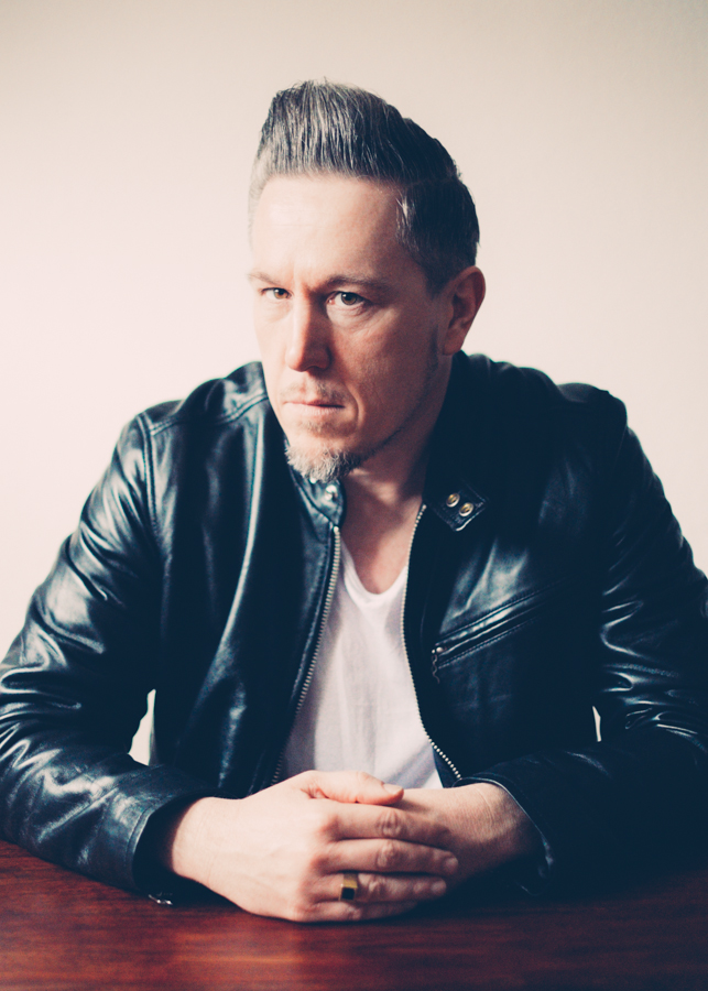 Prof. Dr. Marcus S. Kleiner Photo by: Marvin Böhm